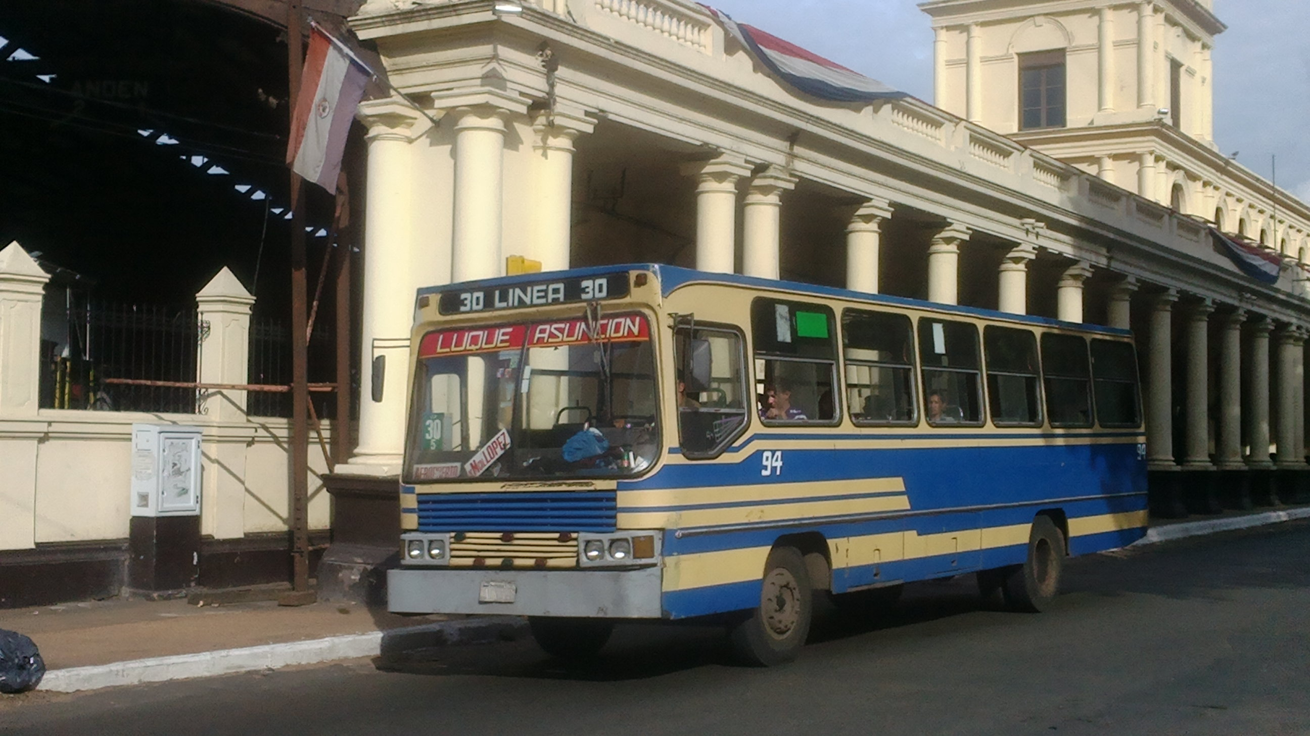 Línea 30 de Asunción, Paraguay